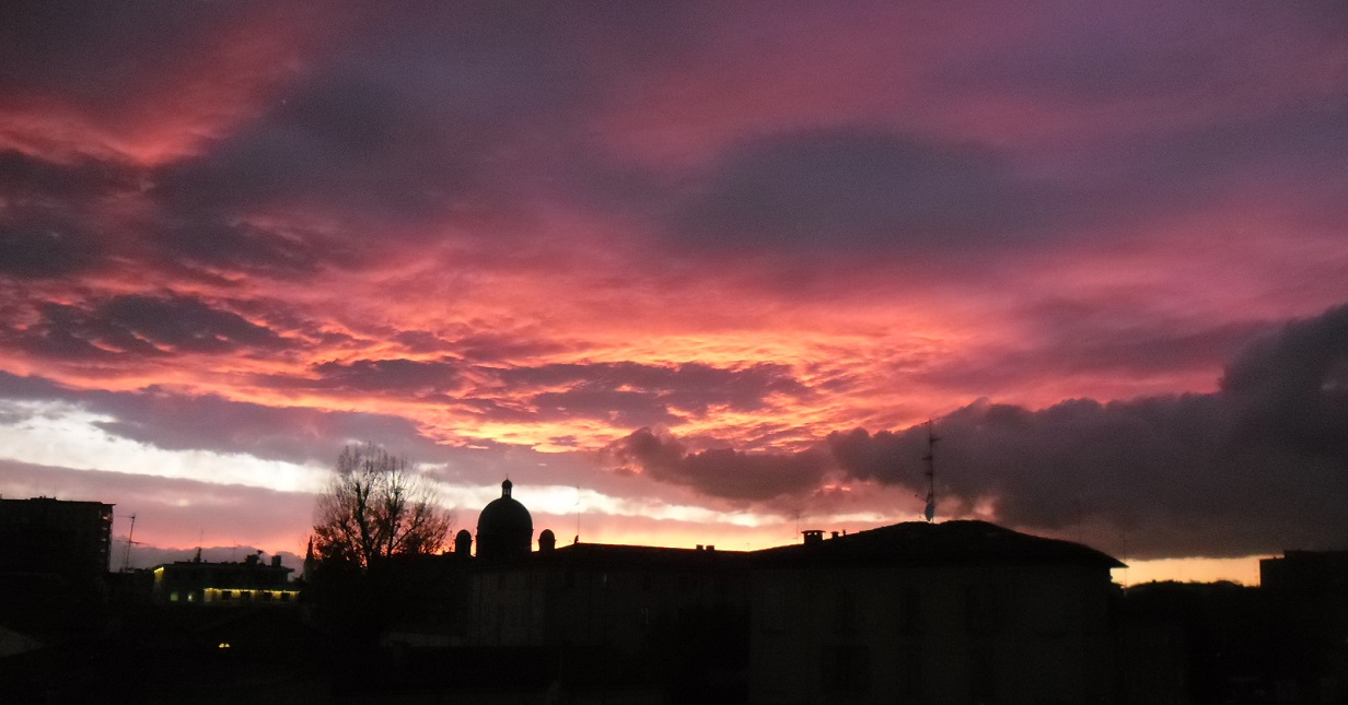 Panorama notturno di Modena, quartiere Crocetta